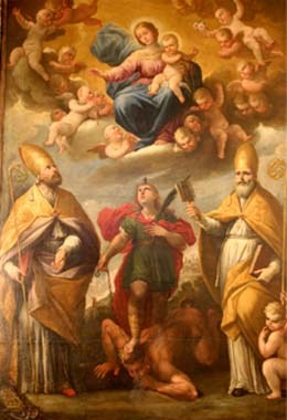 Saints Blaise, Potitus and Leo.